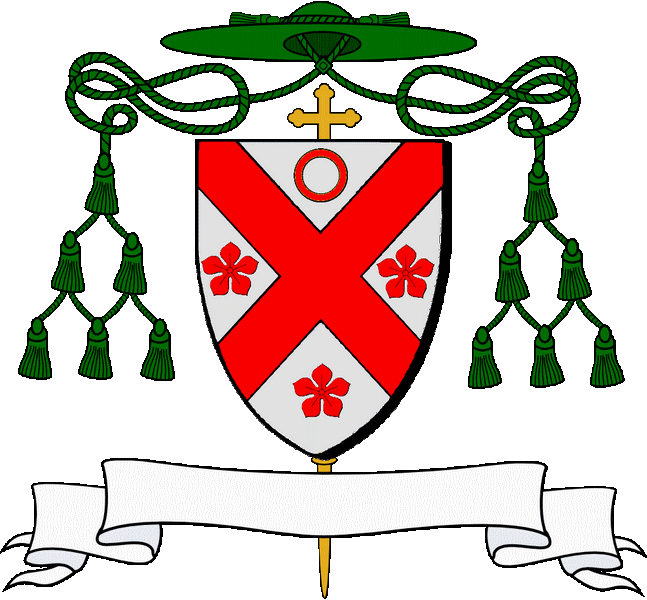 En arc'hant e lammell en gwad, heuliet ouzk kab gant ur ruilhenn, ouzh lezioù hag ouzh beg gant gant teir fempdiliaouenn , an holl en gwad